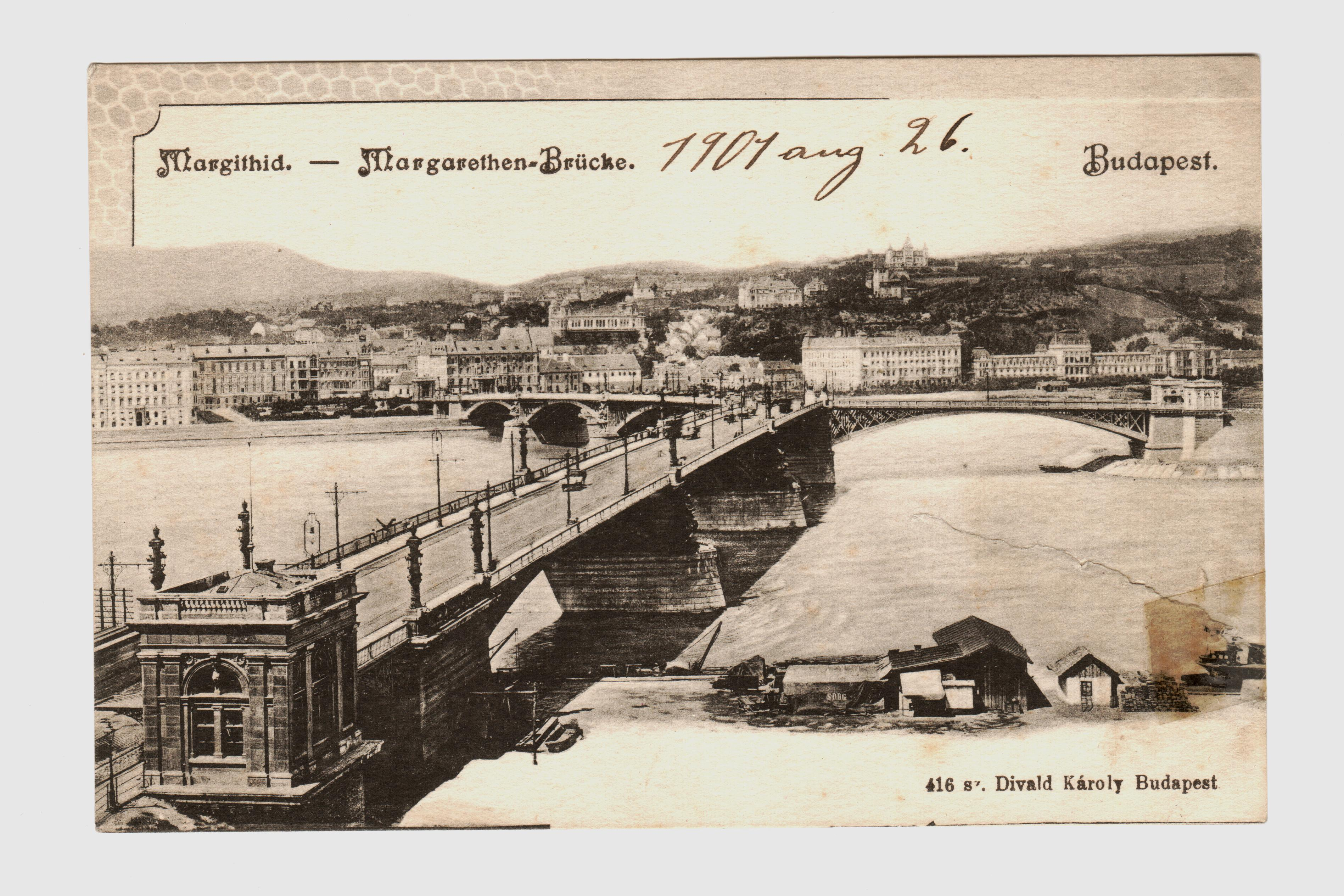 A Margit-híd régi képeslapon (Budapest)